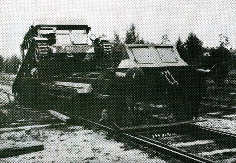 "Felek" podczas prób jazd na prototypie prowadnicy szynowej z 1937 roku. Pojazd jeszcze z numerem 8393 (namalowanym na tylnej ściance lewej skrzynki narzędziowej) oraz w kamuflażu stosowanym w latach 1931-1937. [opis oryginalny]